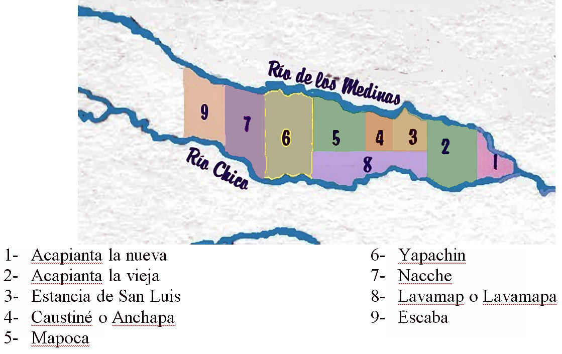 Esquema descriptivo de las estancias ubicadas al sur del río Chico (tucumán) en el siglo XVIII.